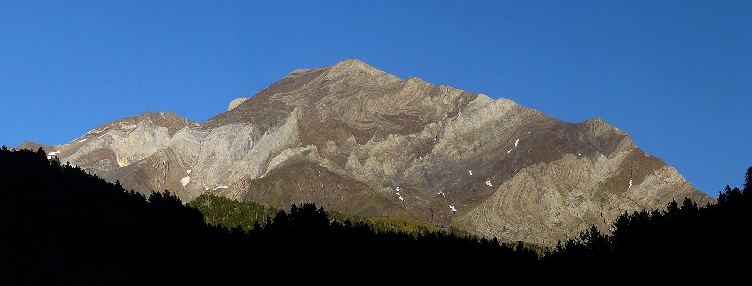 Las Espadas depuis Viados